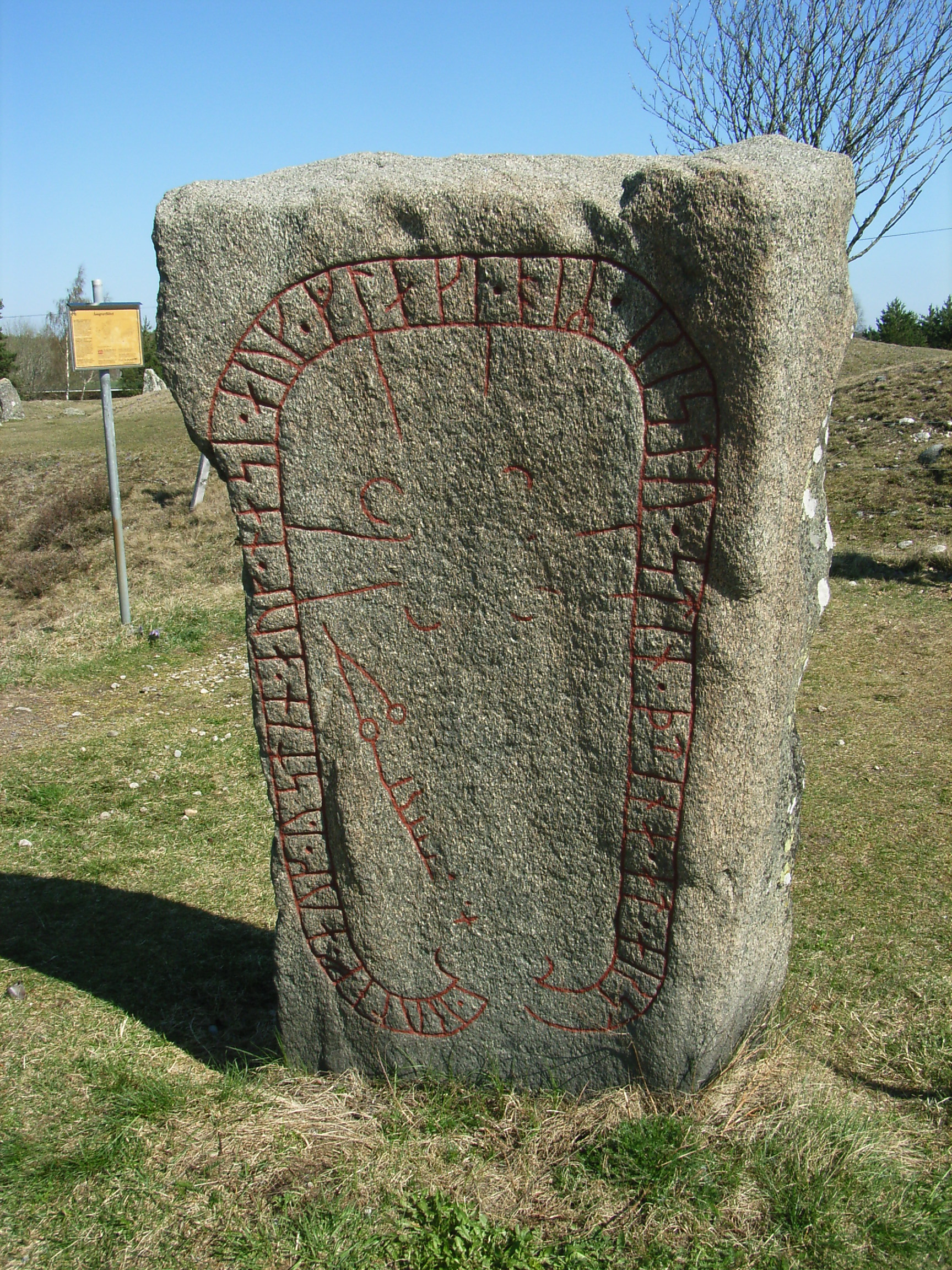 Runsten Sö 200 på Åsa gravfält, Ytterselö socken, Strängnäs kommun, Södermanlands län, Södermanland, Sverige.